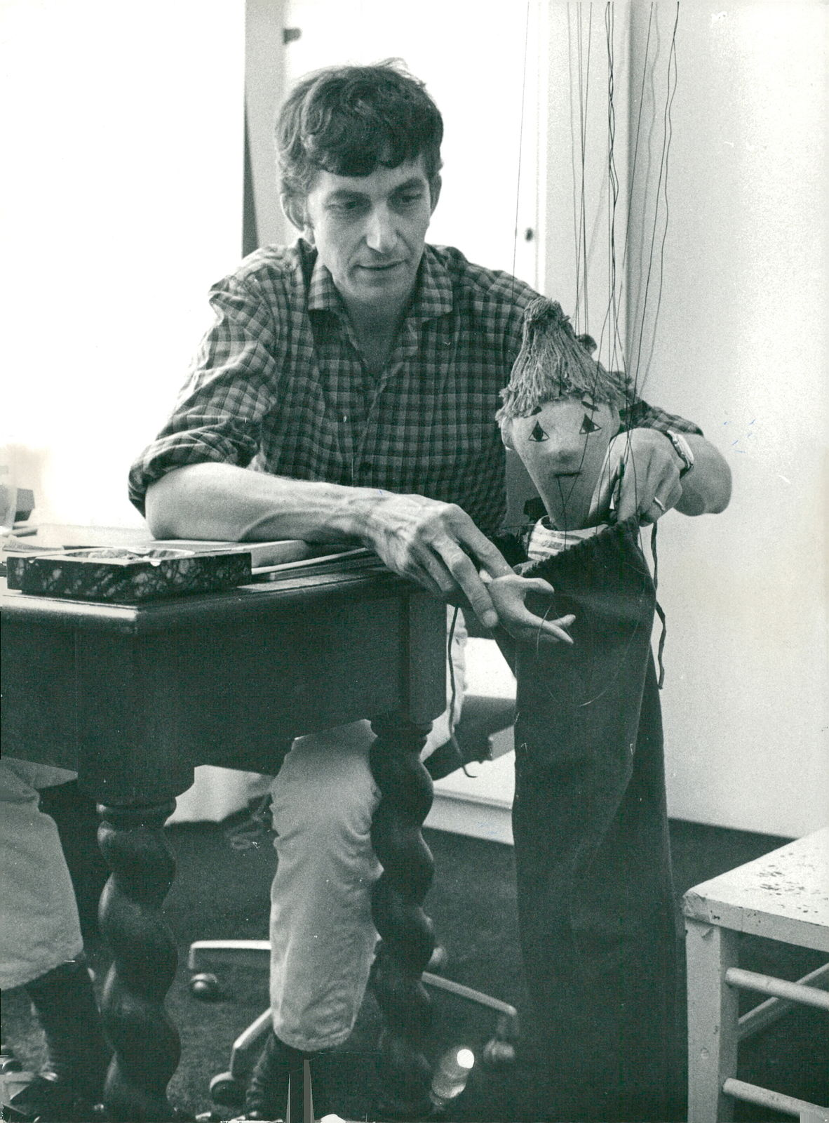 Fotografi av Michael Meschke, infört i Svenska Dagbladet 1968-06-25 s. 10.